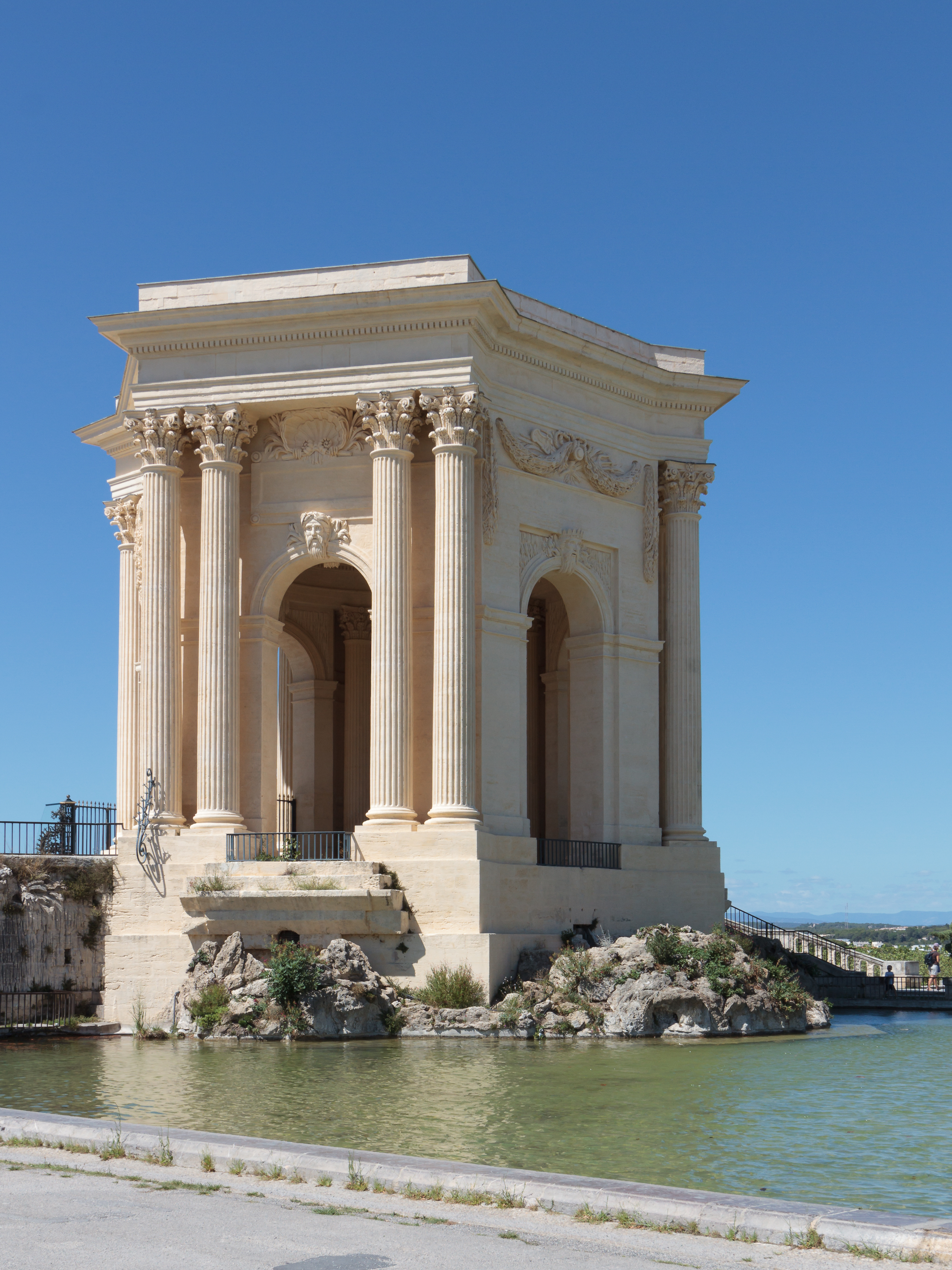 Château d'eau de la promenade du Peyrou à Montpellier, France This building is en partie classé, en partie inscrit au titre des Monuments Historiques. It is indexed in the Base Mérimée, a database of architectural heritage maintained by the French Ministry of Culture, under the references PA00103609 and IA34000346 .